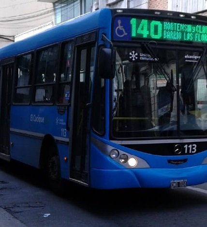 Mercedes-Benz OH 1618 de la línea 140